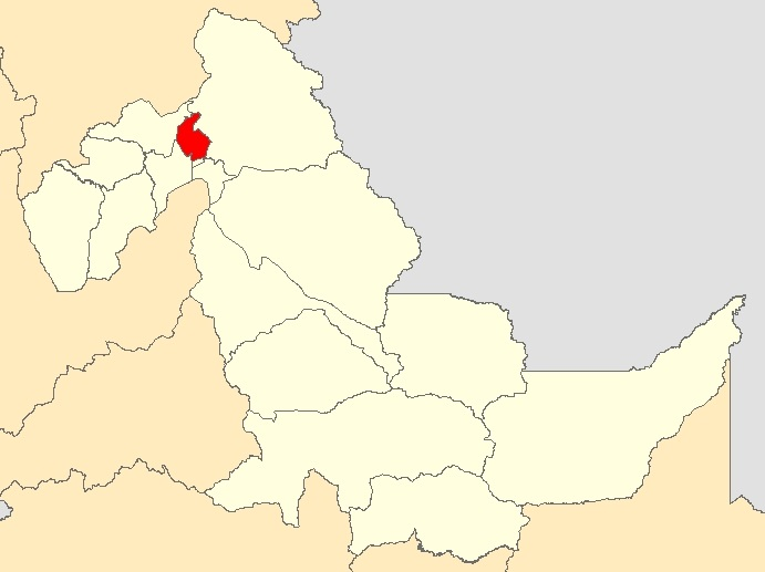 Mapa distrito Yarinacocha,Ucayali - Perú